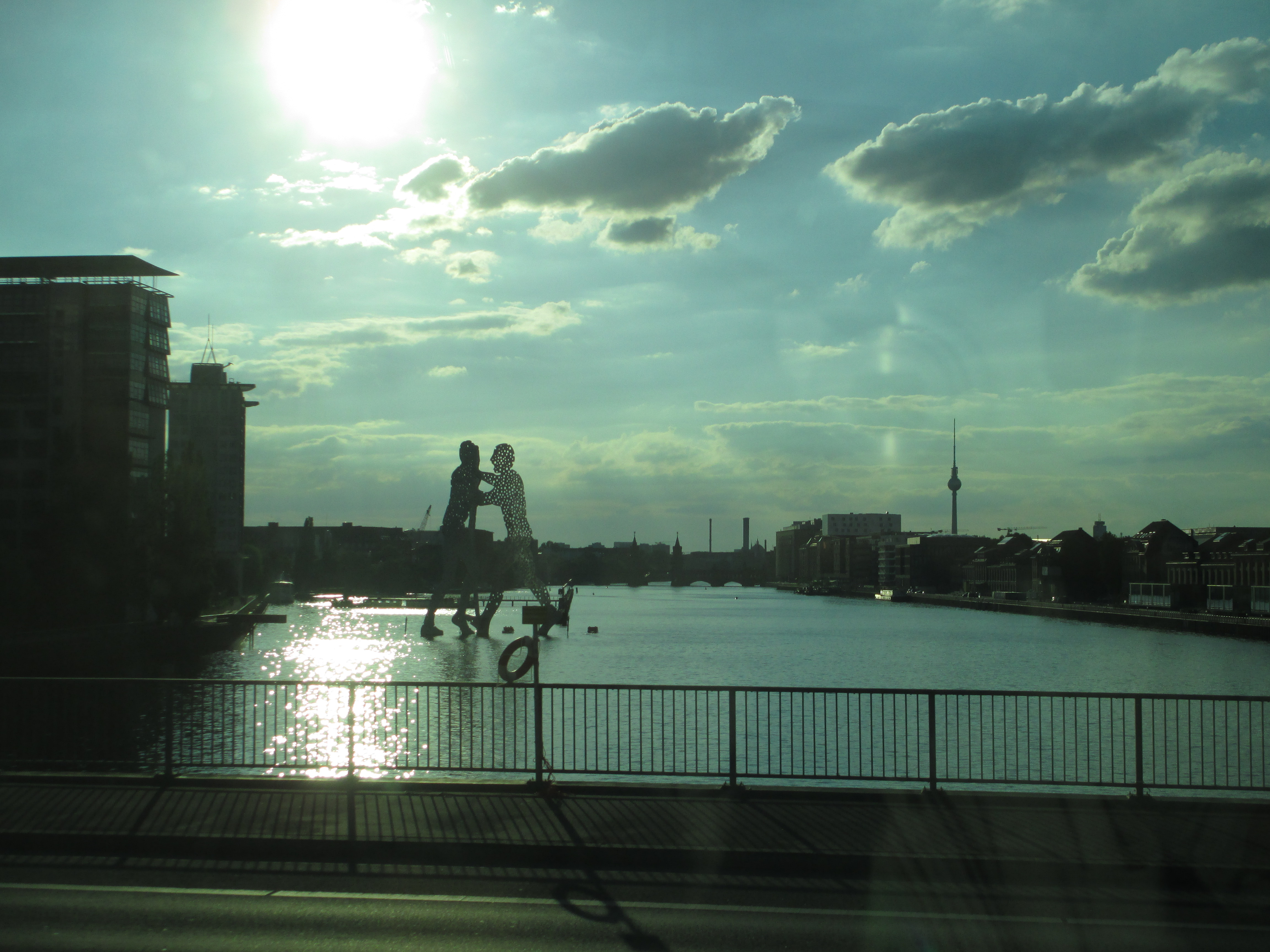 פסל איש המולקולה על נהר שפרה